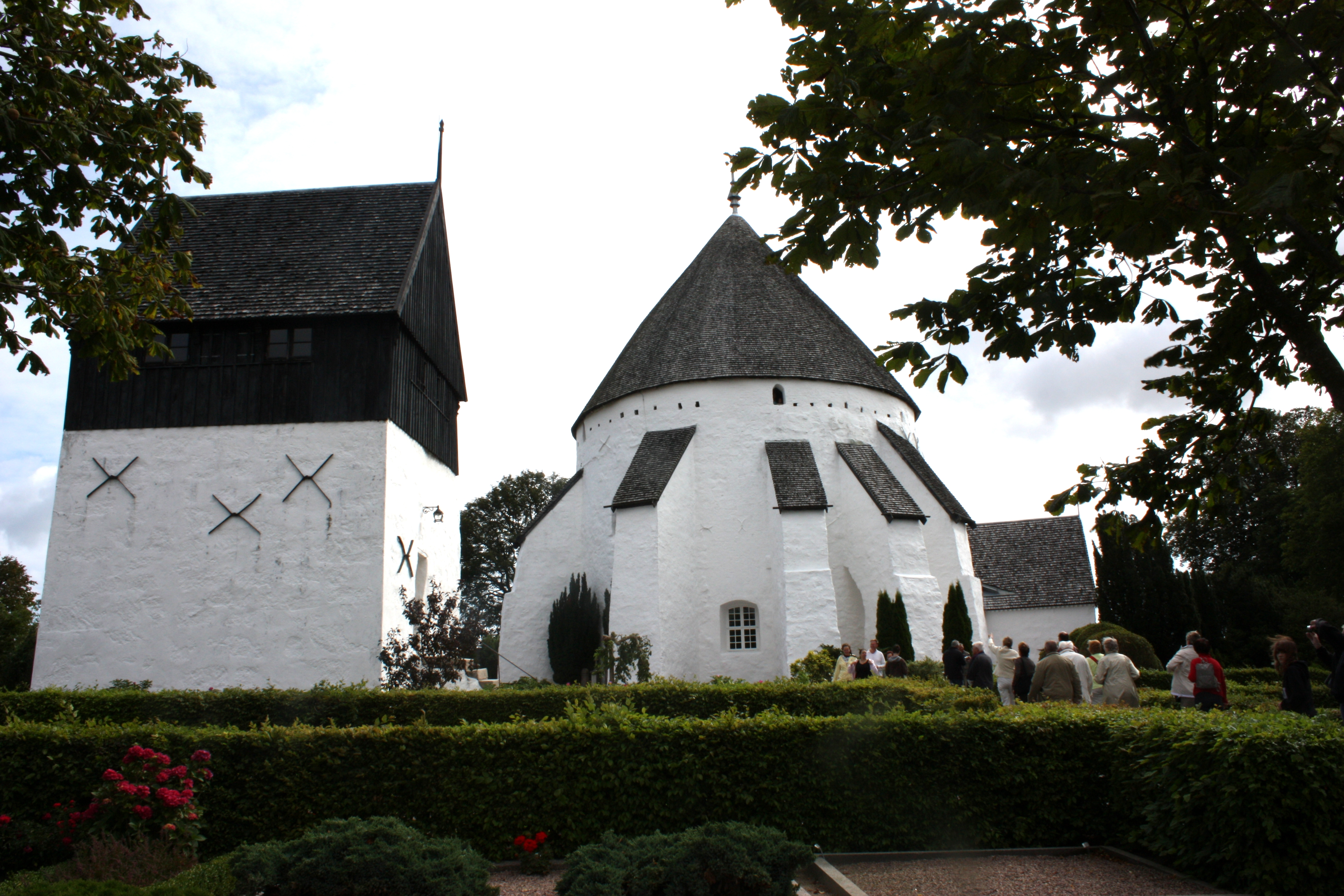 Østerlars kirke , Bornholm, August 2009